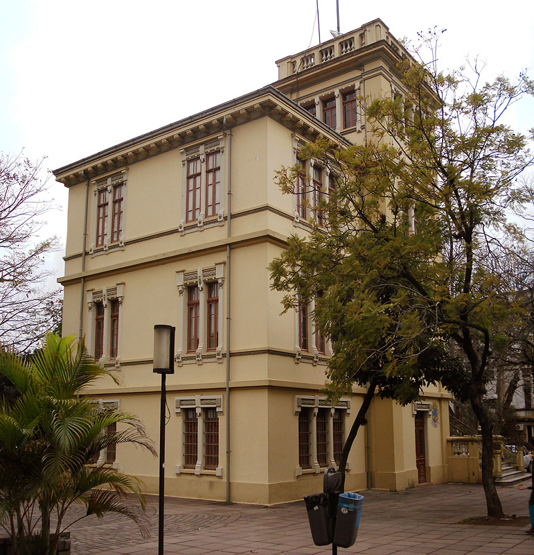 Rádio da Universidade, um prédio histórico da Universidade Federal do Rio Grande do Sul, Porto Alegre, Brasil.